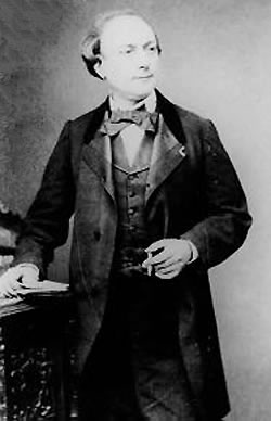 Photographie trouvée par Utilisateur:Semnoz sur le CD-Rom de NetSurf n°11 en janvier 1997 librement diffusable. Photographie datant du XIXe siècle